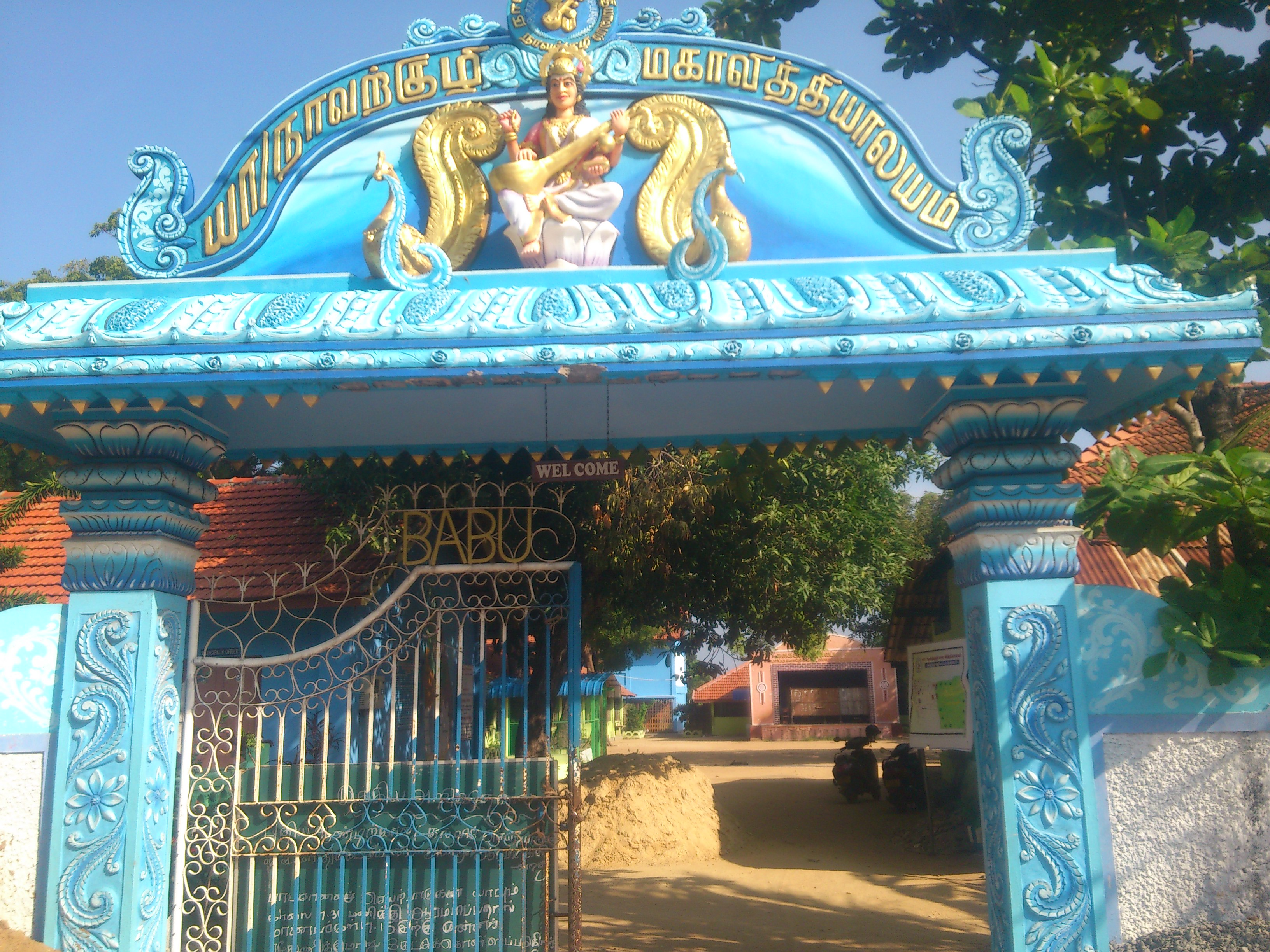 நாவற்குழி மகாவித்தியாலயம்